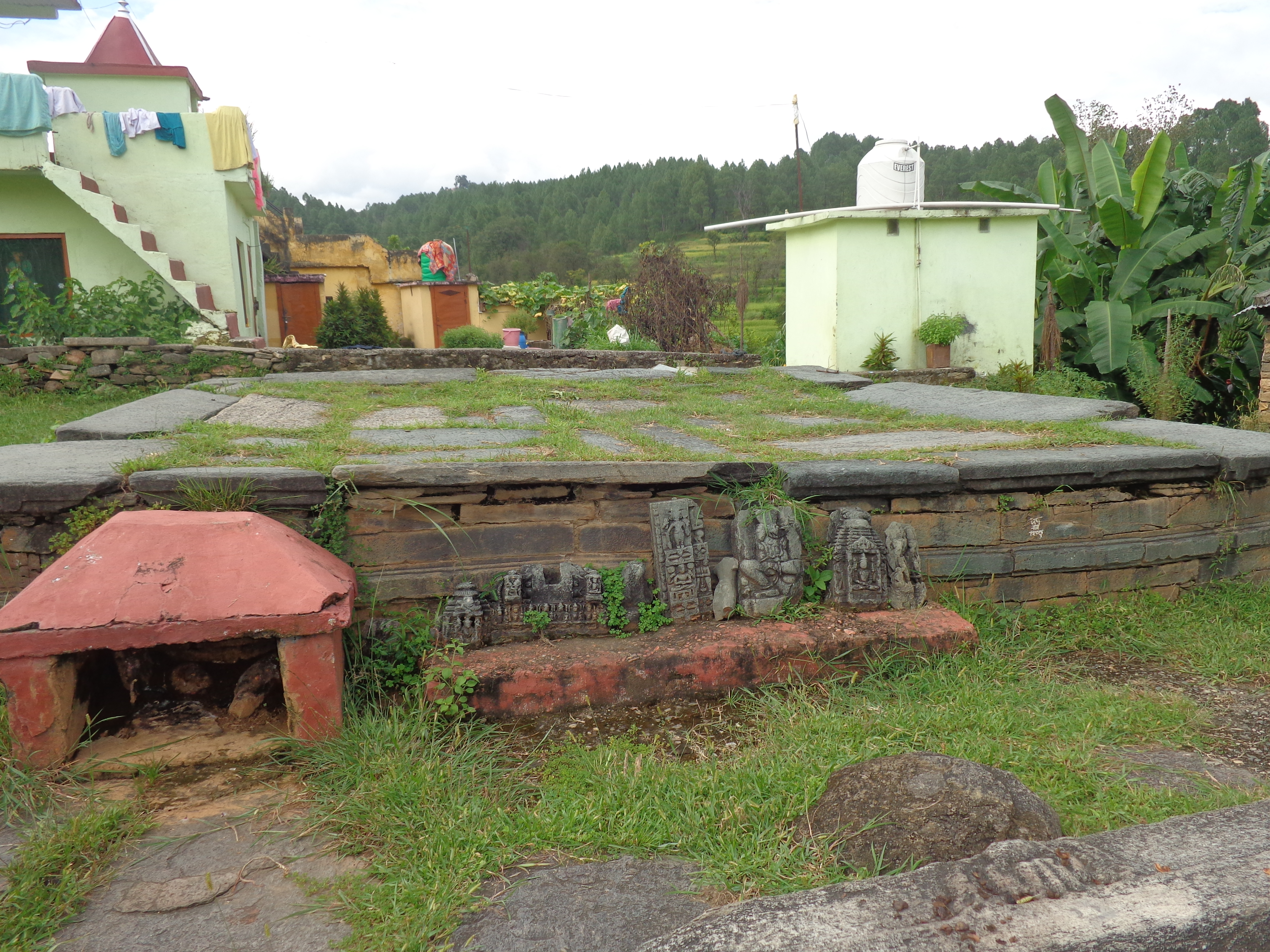 नेपाली: Lilachauri Hat Kartikeyapur Kumau